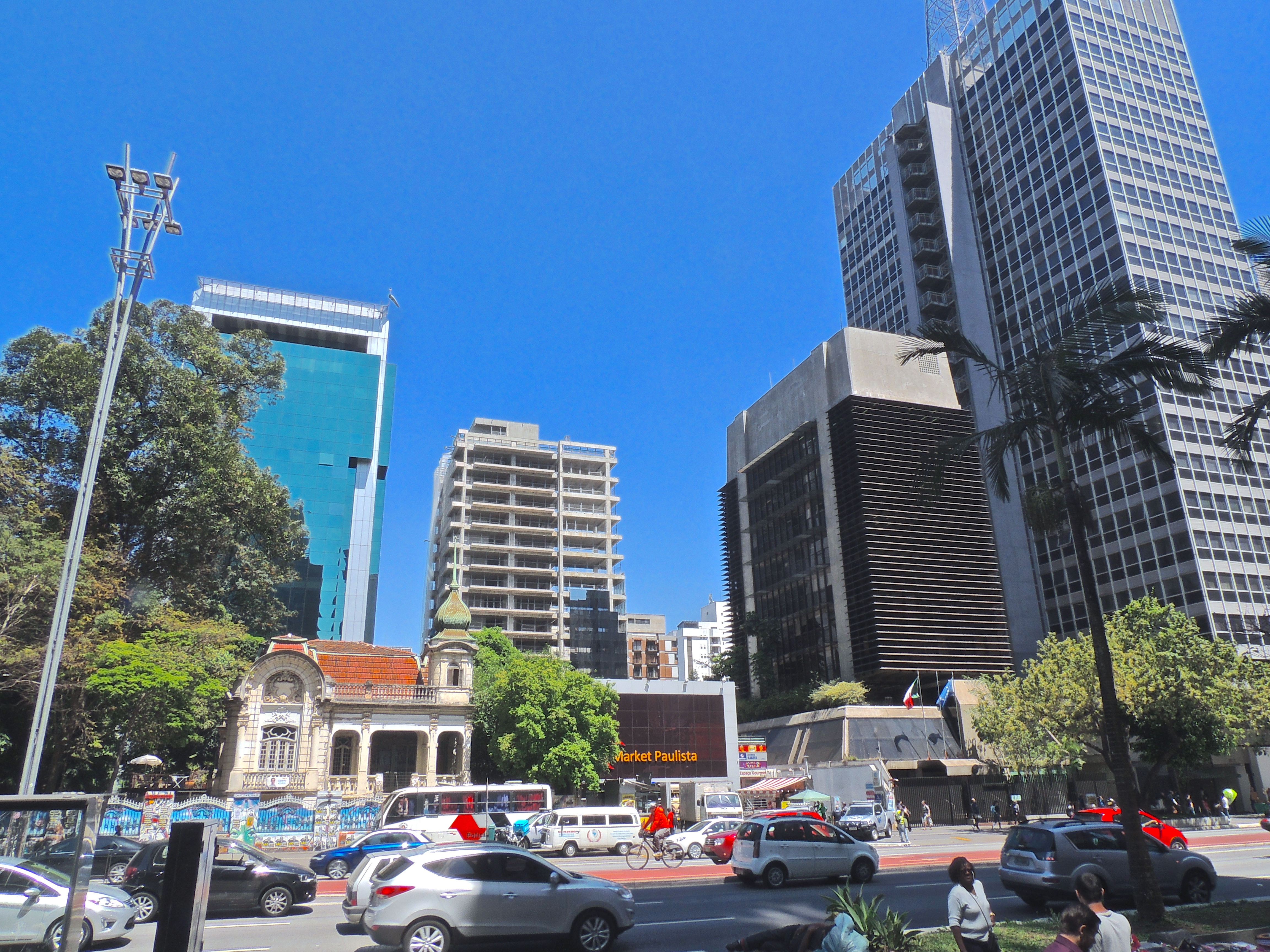 Casarão Joaquim Franco de Mello, construída em 1905, localizada na avenida Paulista, 1.919, em São Paulo (SP) Brasil.